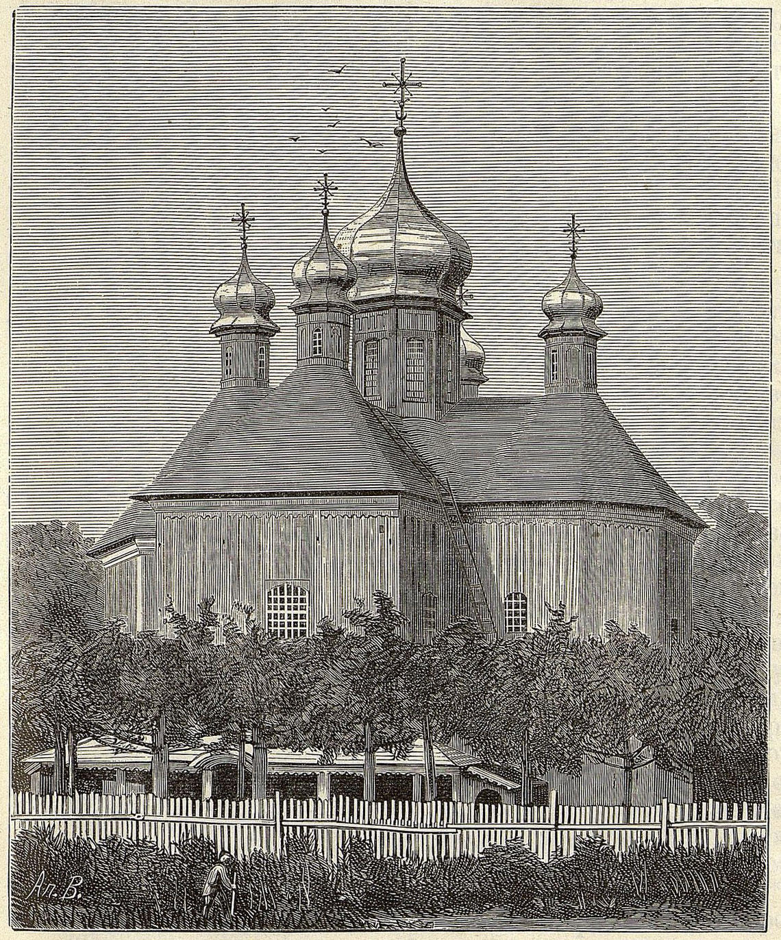 Беларуская (тарашкевіца): Ворша (Vorša), Куцейна (Kuciejna). Саборная царква манастыра Яўленьня Гасподняга